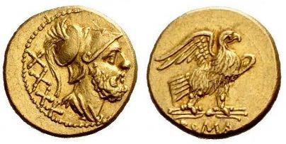 Aureo XXXX assi D Testa barbata di Marte a destra, con elmo corinzio. Dietro: XXXX R Aquila ad ali spiegate su fulmine a destra. Legenda: ROMA Au Ш 12-13 g. 2,12-2,26 211 a.C.